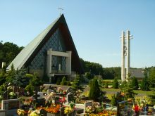 Kościół parafialny pw. Św. Trójcy w Murowie